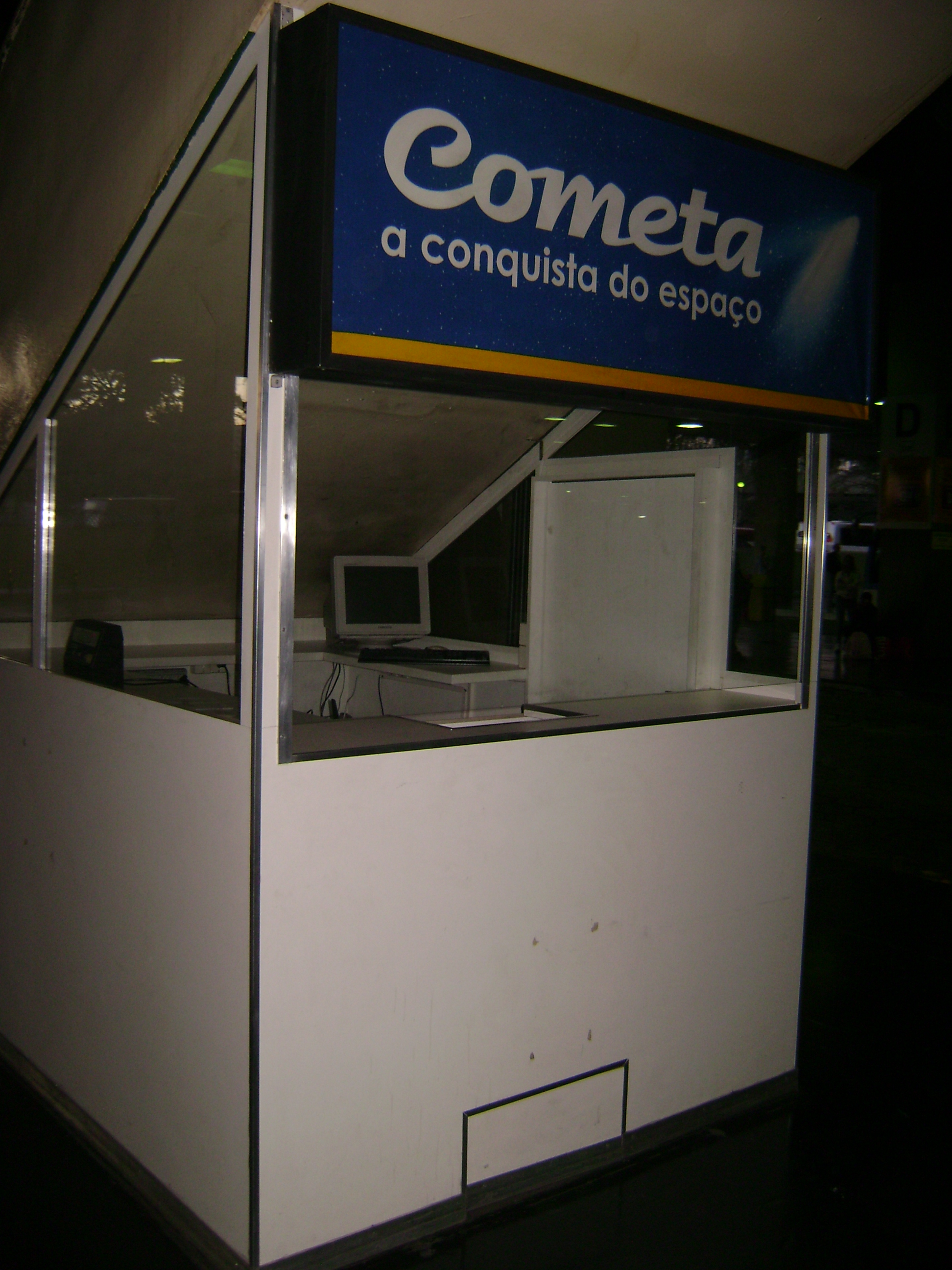 Guichê da Cometa no terminal rodoviário de Belo Horizonte, em Minas Gerais, Brasil.